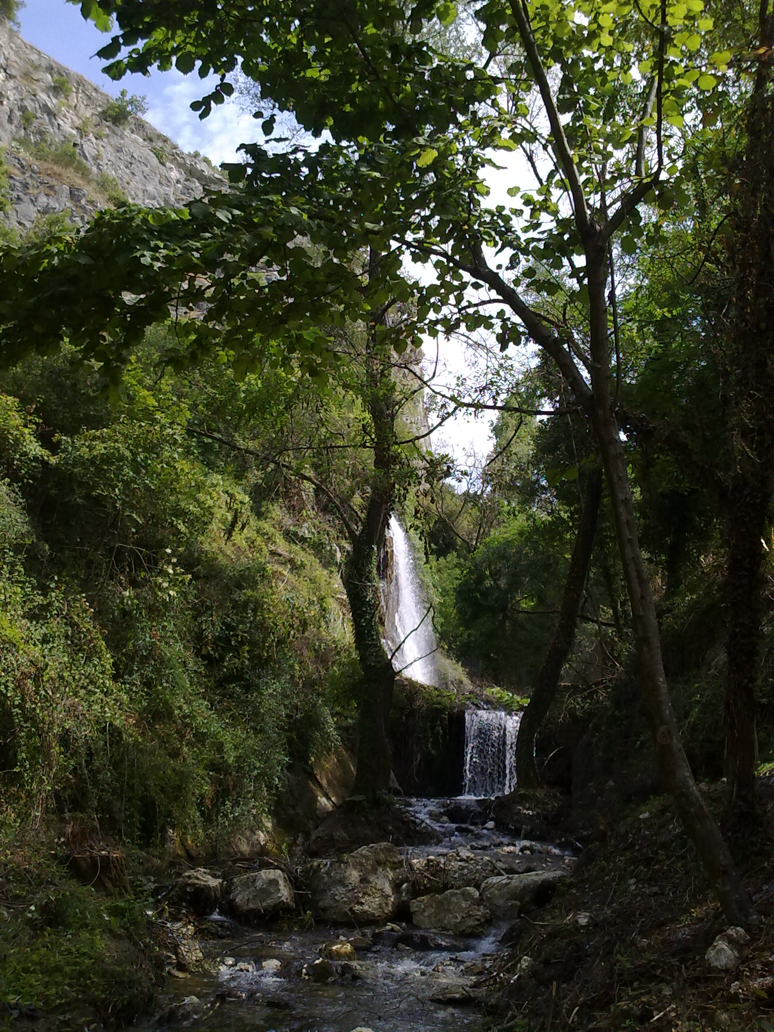 Foto del Parco Fluviale di Caposele